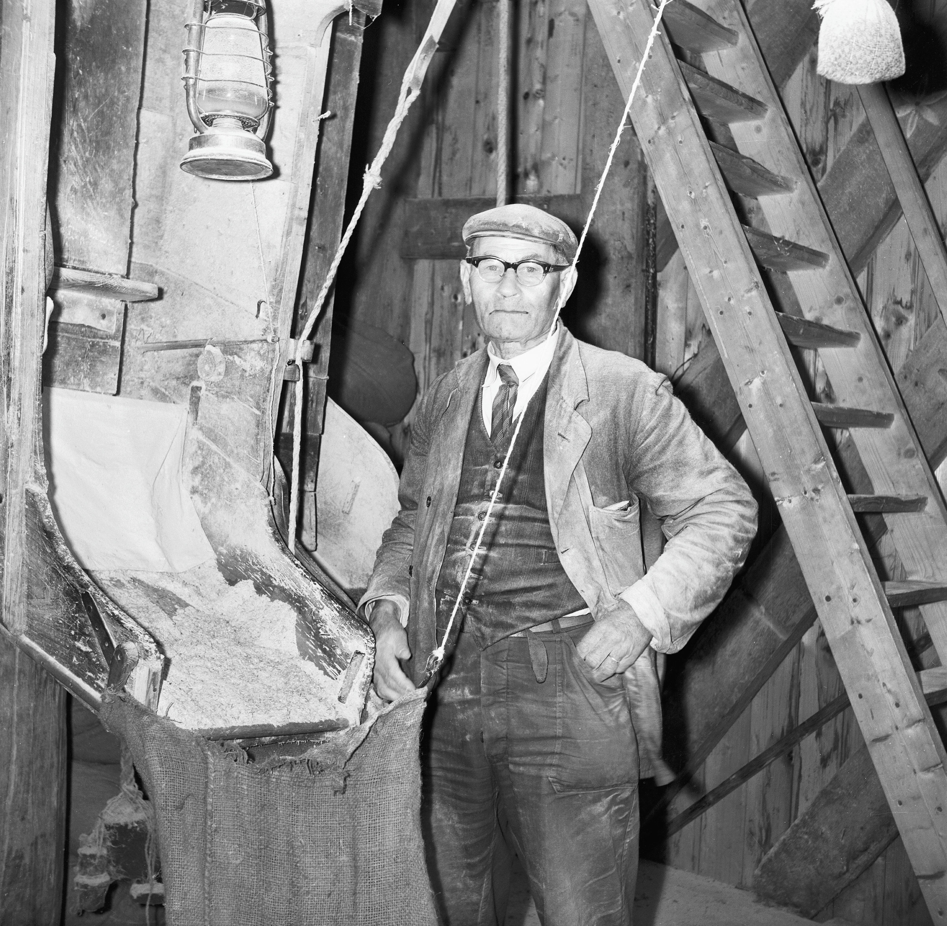 Diversen: Standerdmolen, maalbak